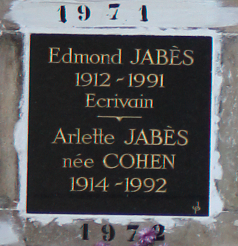 Case n°1971 d'Edmond Jabès (1912-1991), au columbarium du cimetière du Père-Lachaise.